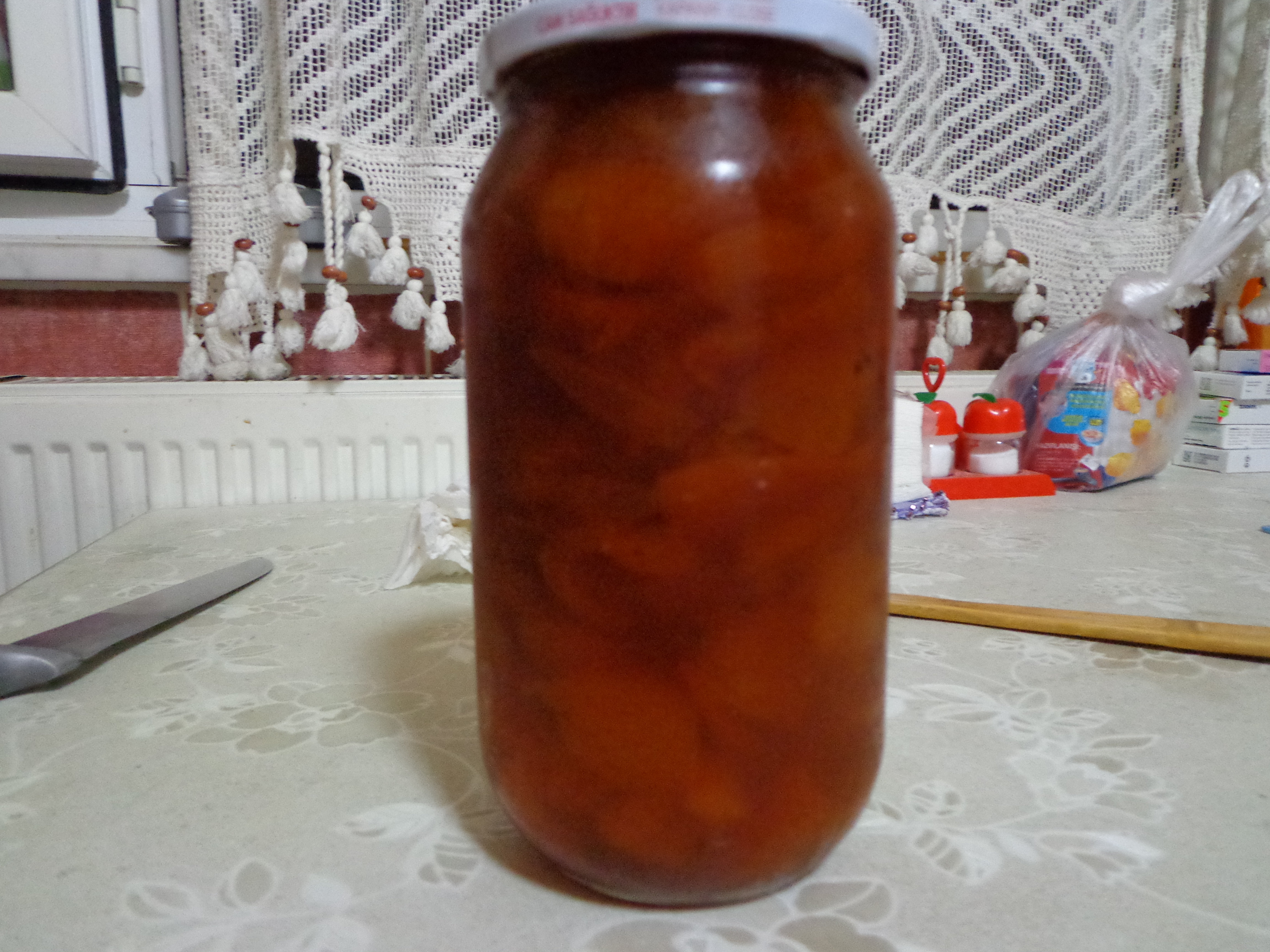 Kavanozun içindeki kayısı reçeli